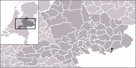 Locatie voormalige gemeente Dinxperlo. Afbeelding gemaakt door gebruiker:Mtcv en vrij te gebruiken.